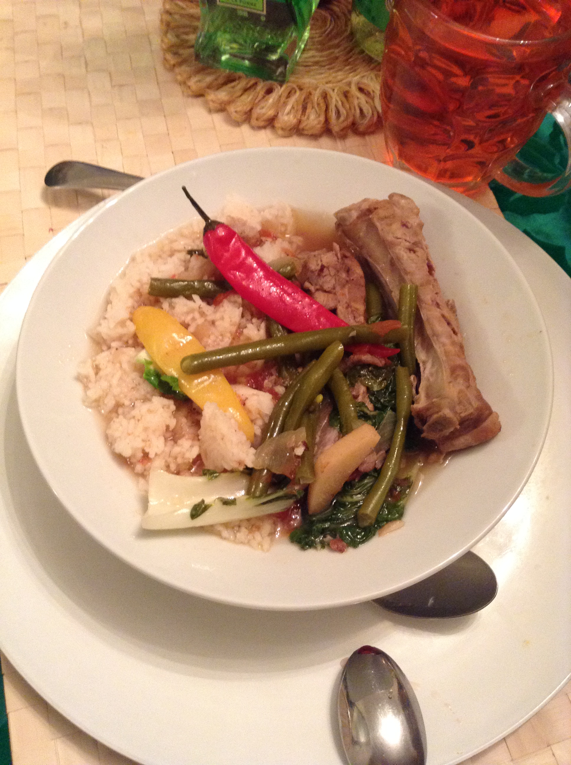 Tagalog: Sinigang na Baka